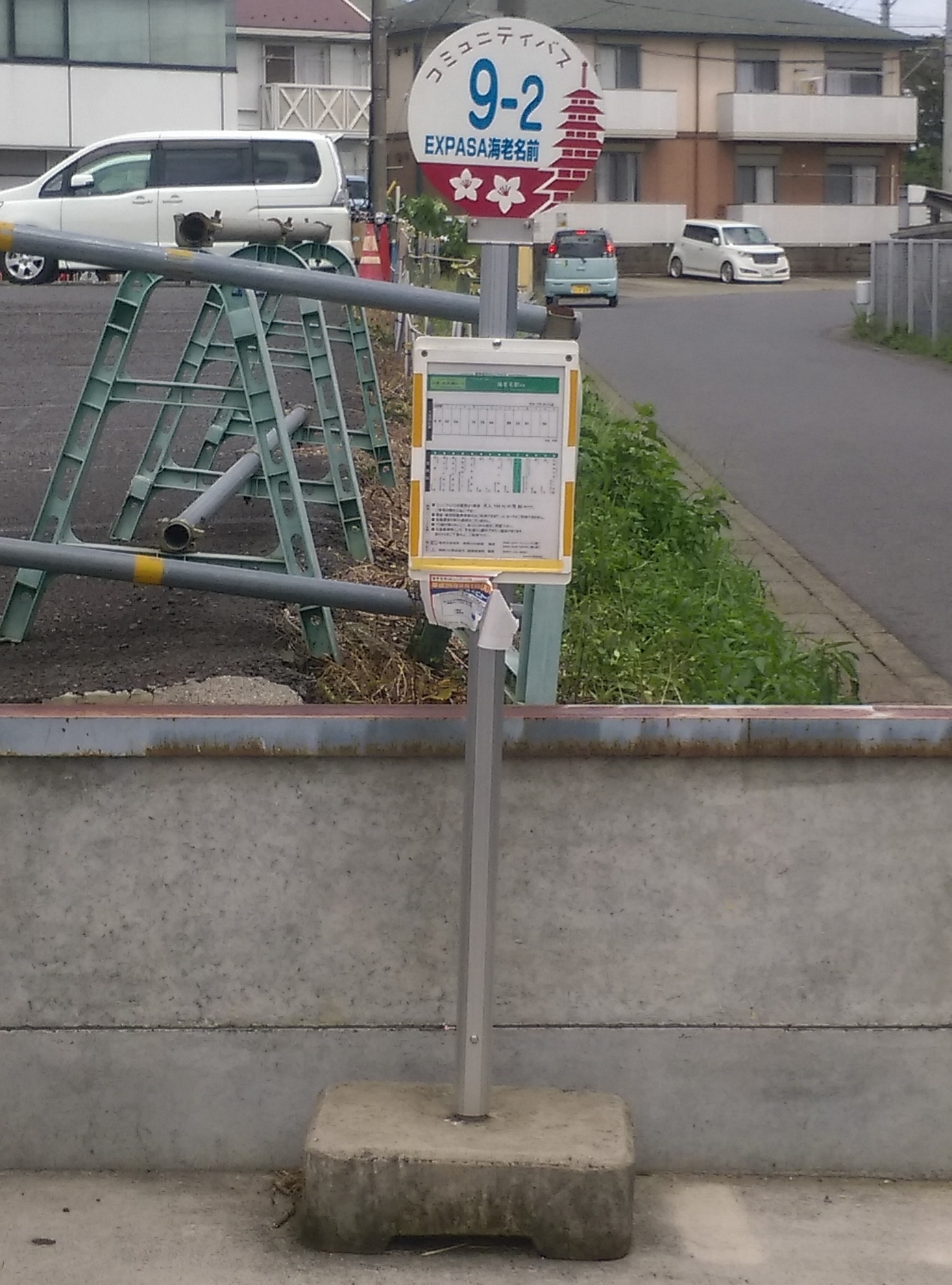 東名高速道路の海老名サービスエリアのぷらっとパークにある海老名市コミュニティバス「EXPASA海老名前」バス停留所。2016年8月23日撮影。